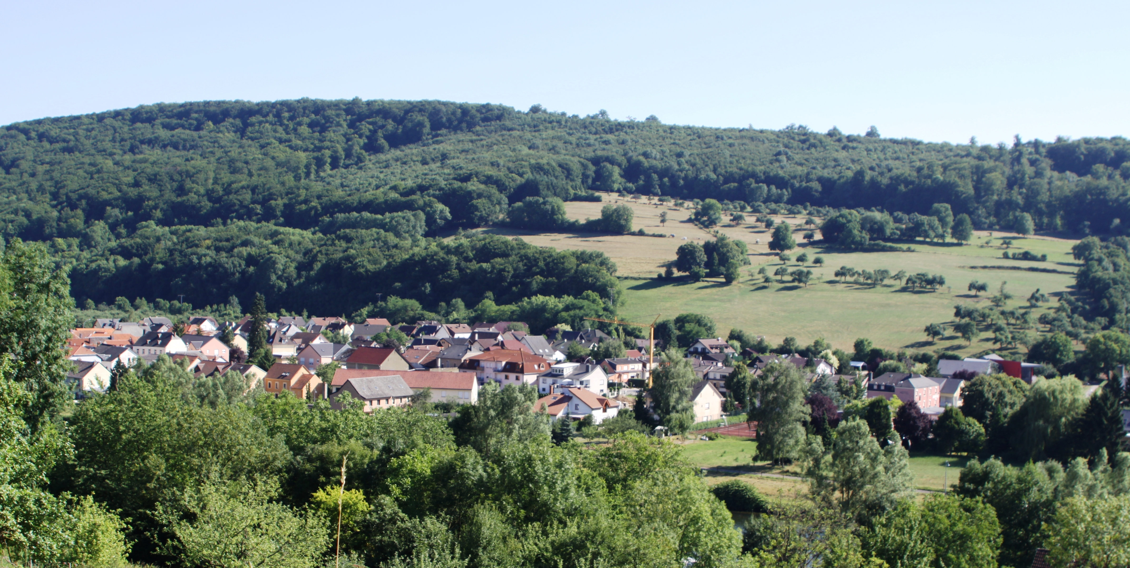 Steenem vu Minden aus gesinn.